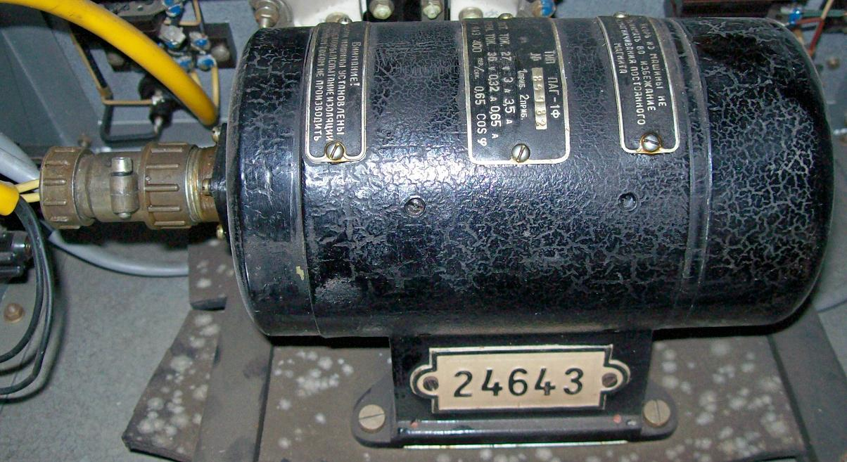 Einankerumformer 27V Gleichspannung in 36V / 400Hz Drehstrom. Durchmesser 100mm. Sowjetunion ca. 1965, in einem Testgerät für Kreiselinstrumente